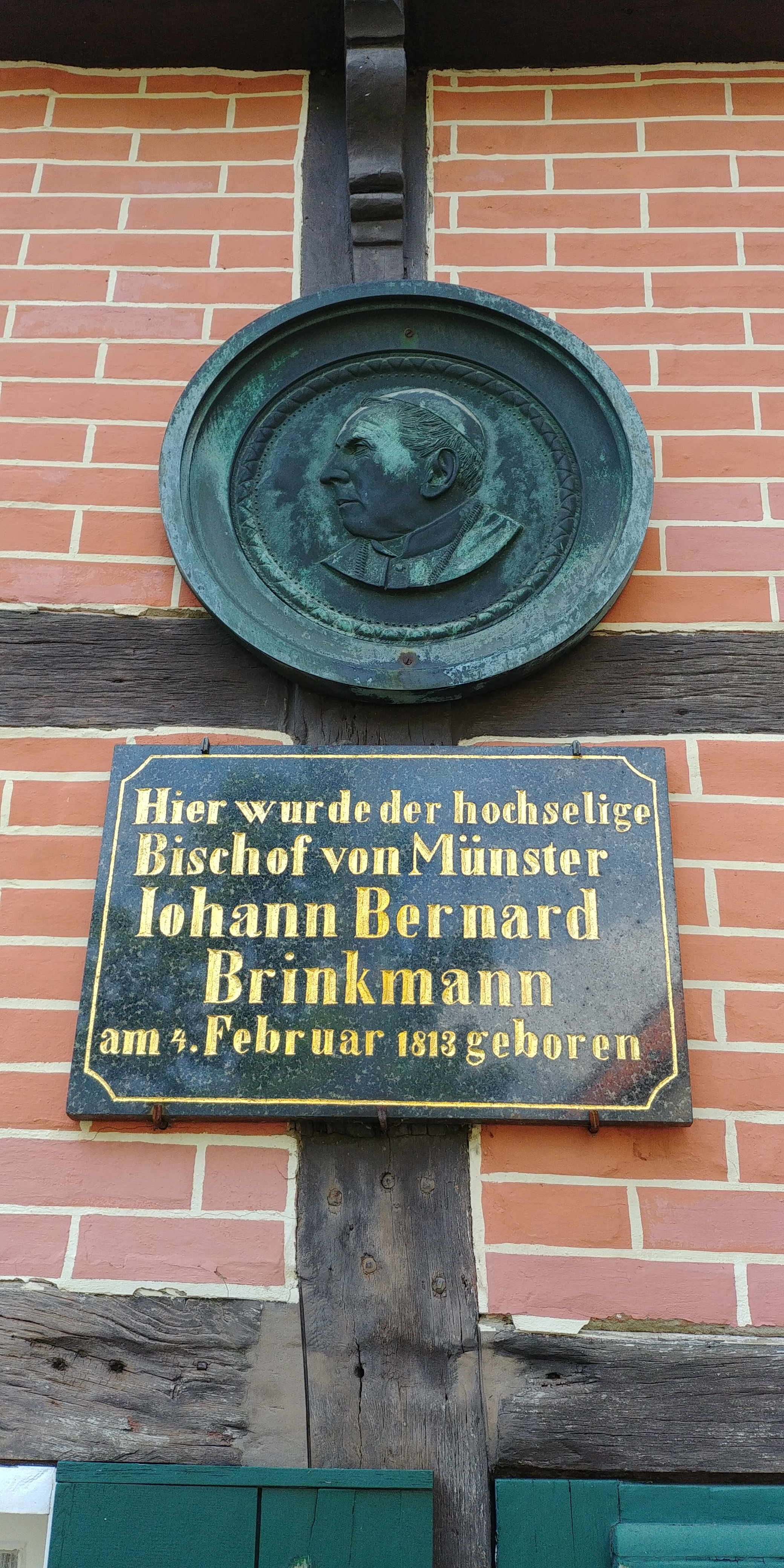 Informationstafel Johann-Bernhard Brinkmann Haus in Everswinkel